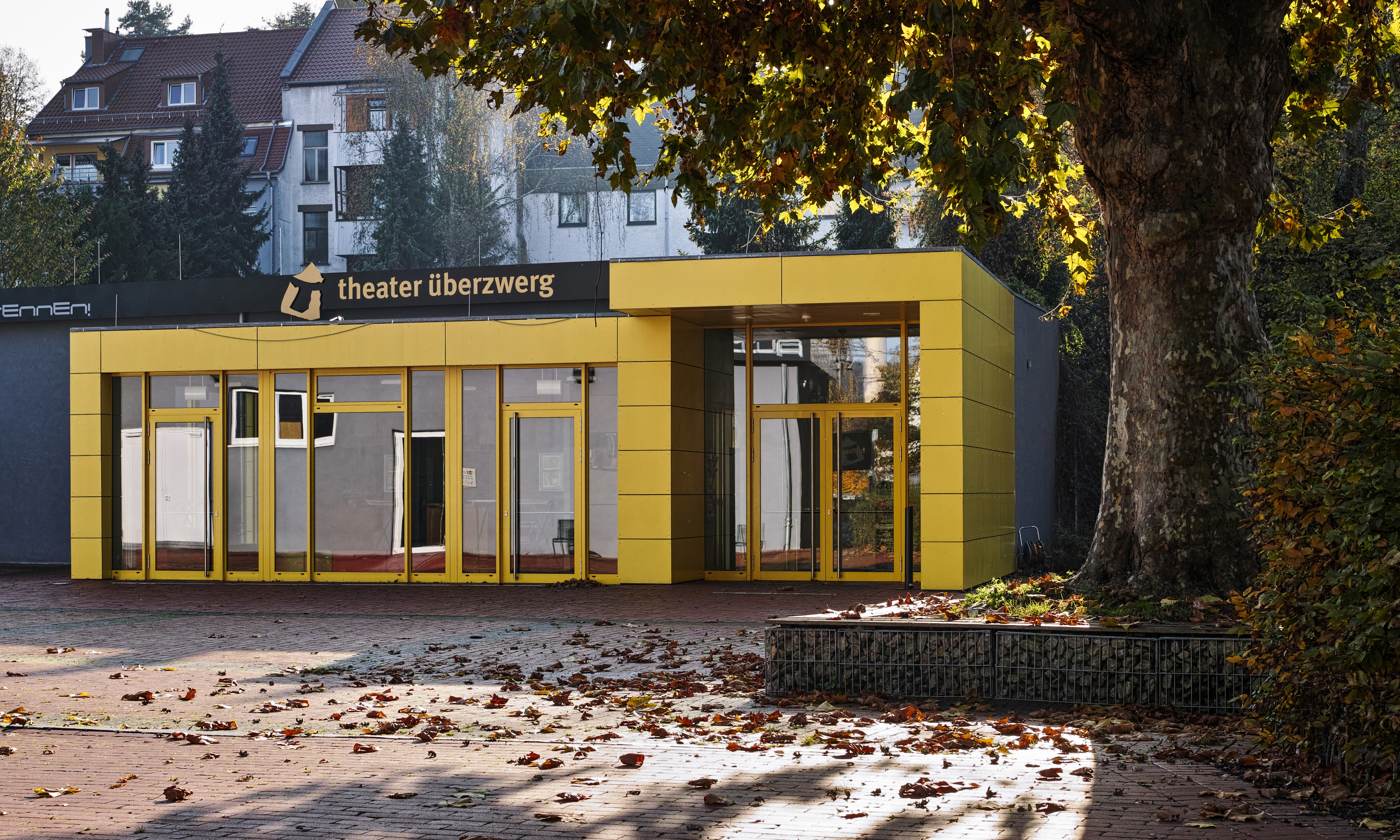 Das Jugend- und Kindertheater Überzwerg im Saarbrücker Stadtteil St. Arnual.